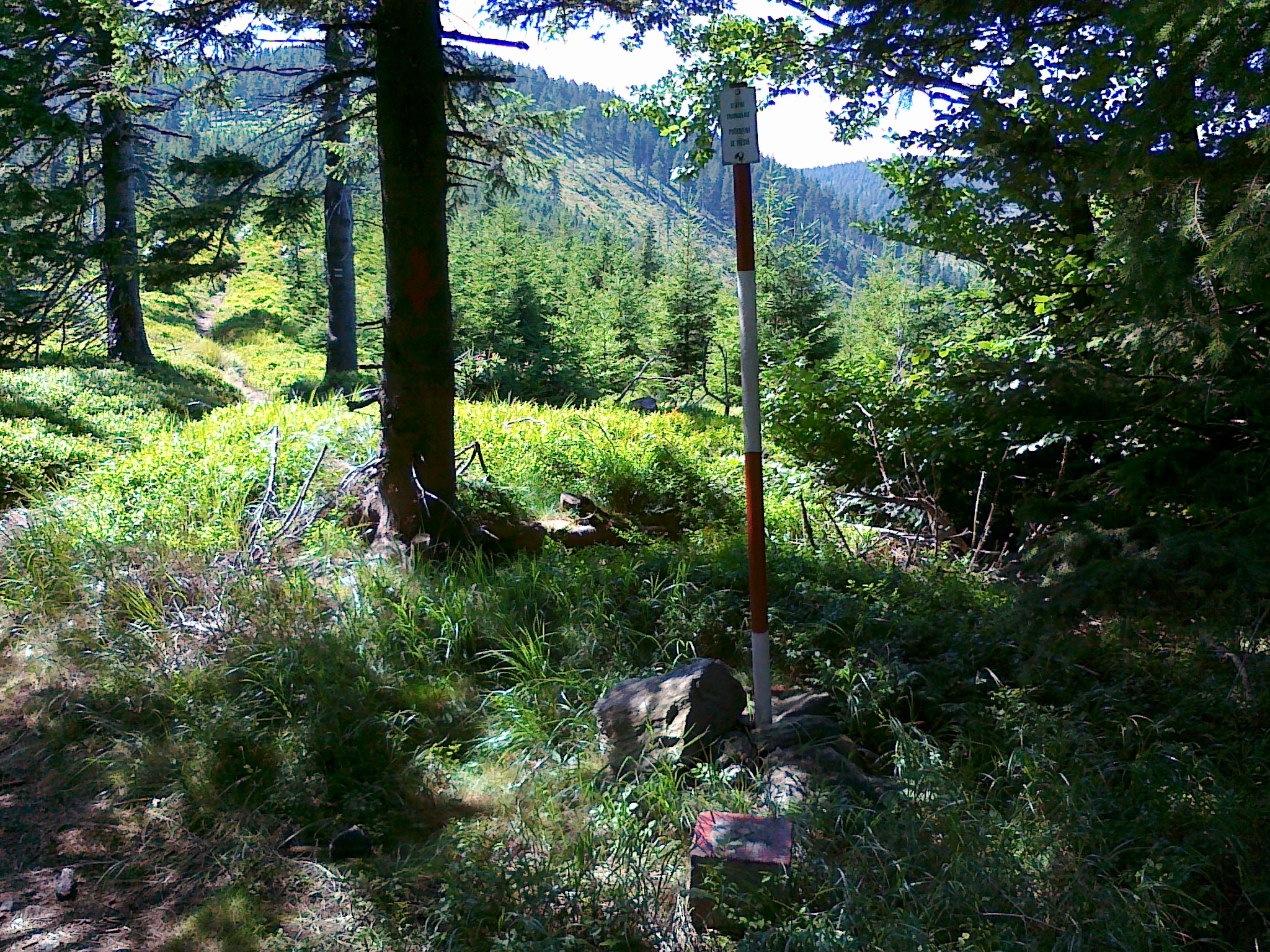 Punkt geodezyjny blisko szczytu góry Točník - 1146 m